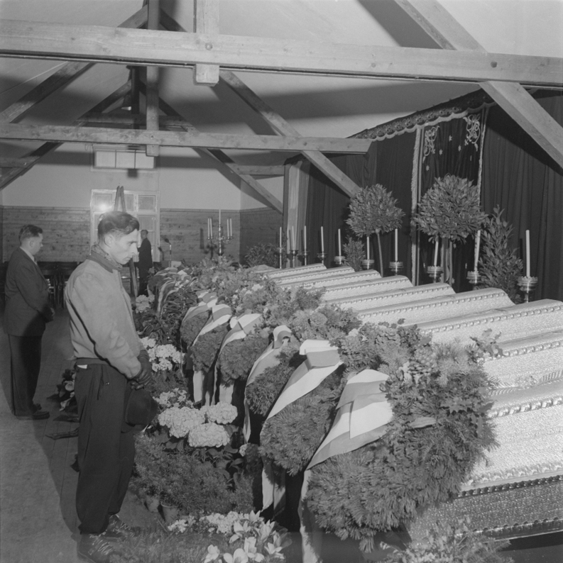 Heilbronner Dachsteinunglück: Aufgebahrte Särge in der Obertrauner Sporthalle